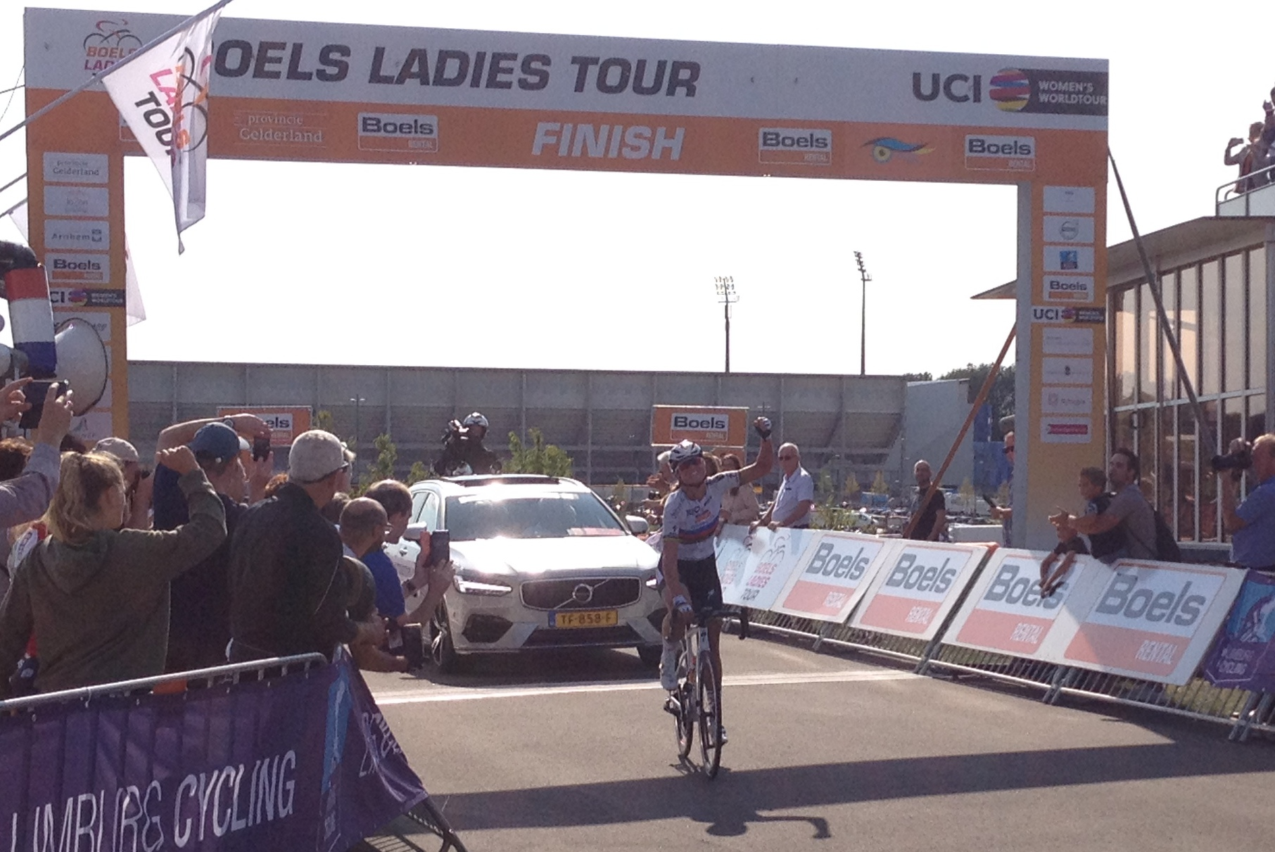 5e etappe van de Boels Ladies Tour 2018 door Zuid-Limburg, finish in Sittard op het Tom Dumoulin Bike Park.